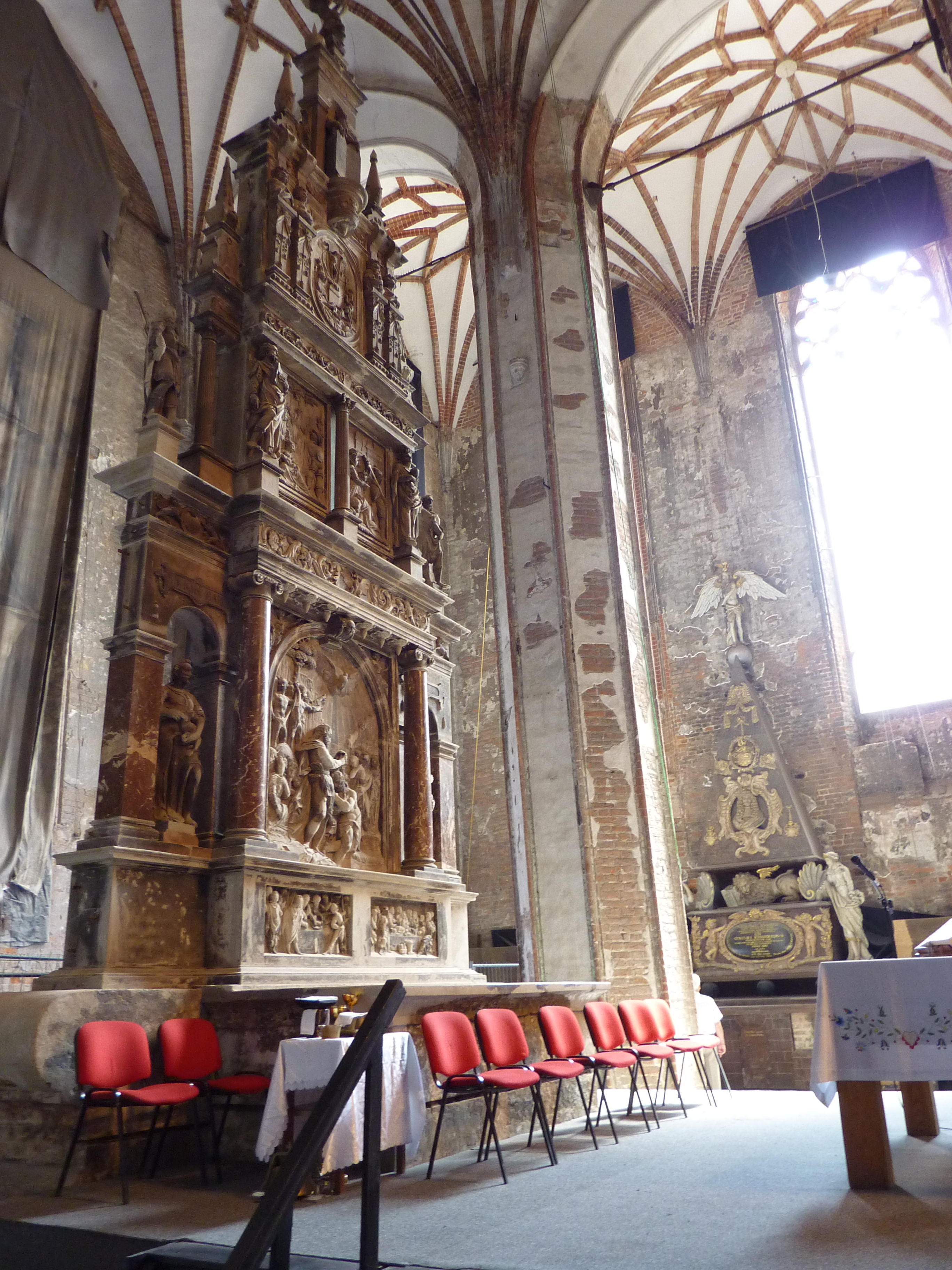 Ołtarz główny i w oddali epitafium Schroederów